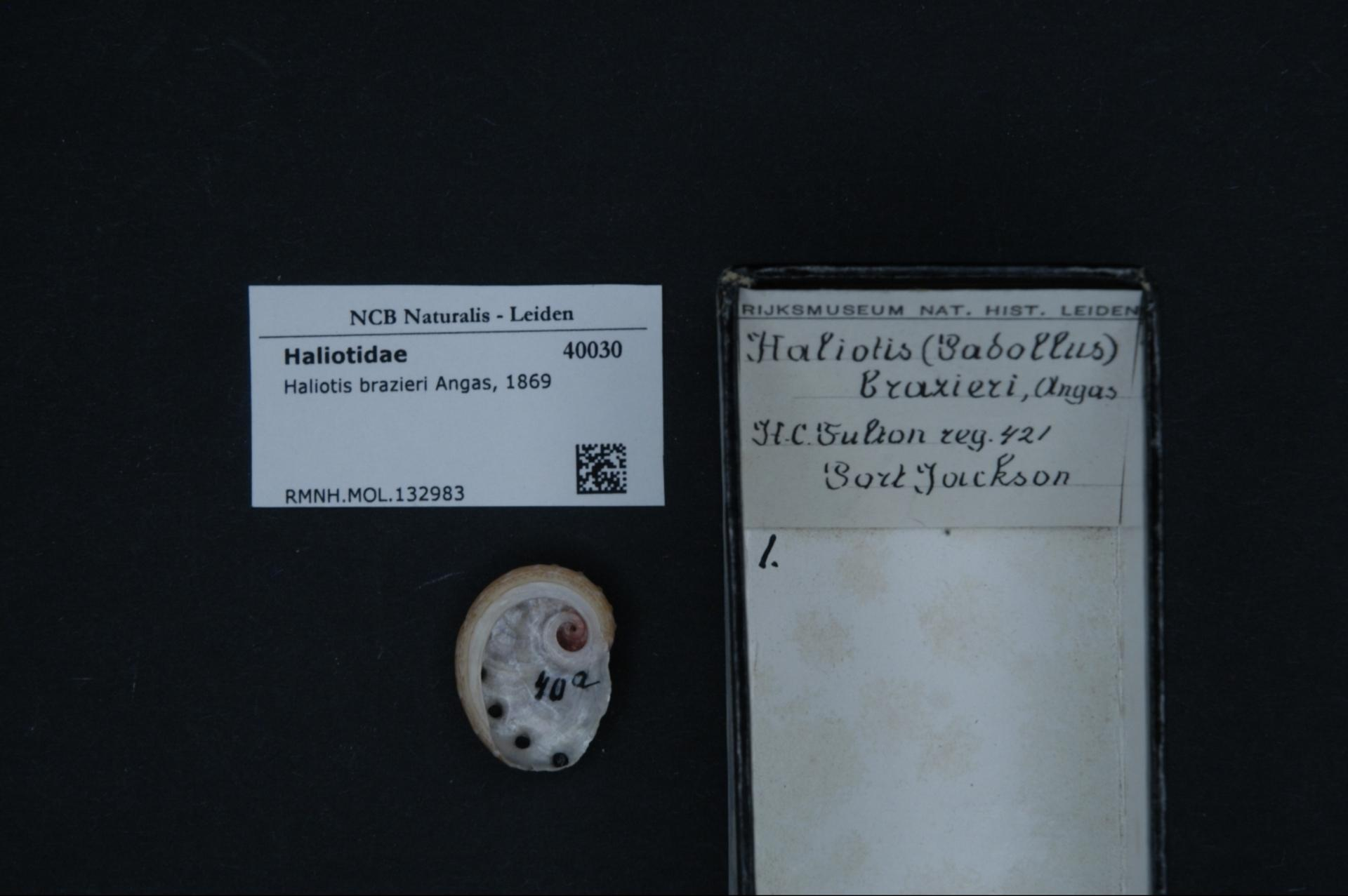 Haliotis brazieri Angas, 1869